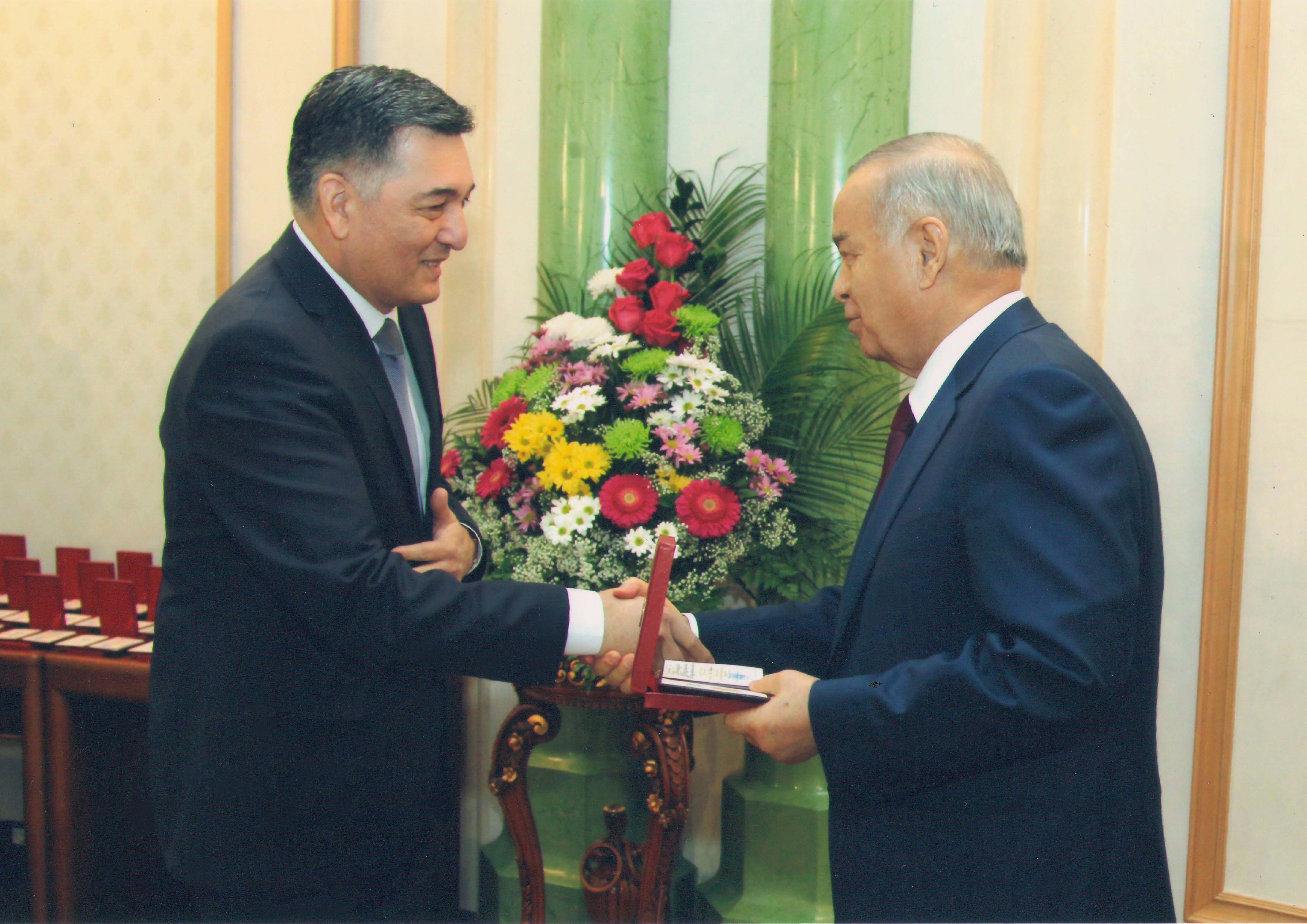 Вручение звания Народный Артист РУзб